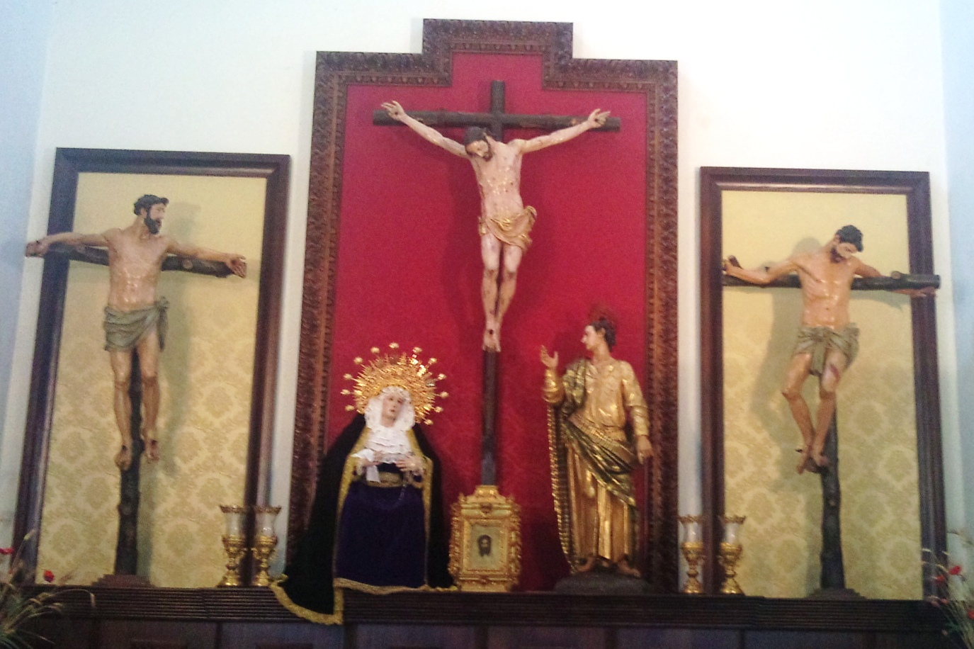 Grupo escultórico de El Calvario, obra de Sebastián de Solís. Se ubica en el presbiterio de la iglesia de San Juan de Jaén.